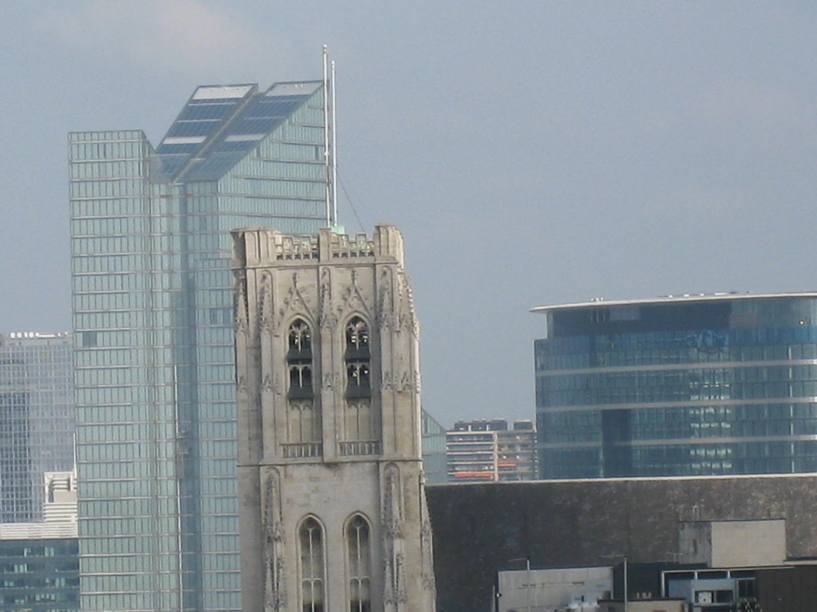 De toren van de kathedraal met een zicht op Brussel